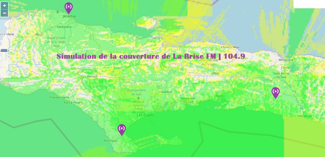 La-Brise-Couverture